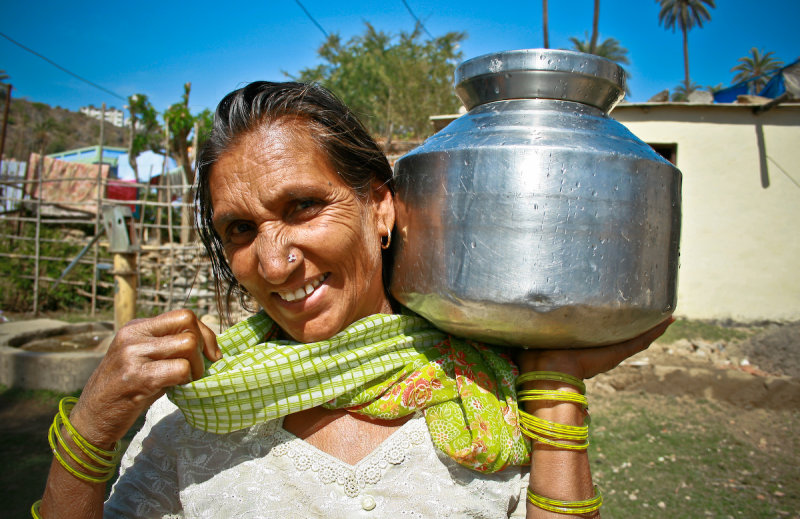 Mount Abu Rajasthan Voir l'oeuvre de l'artiste